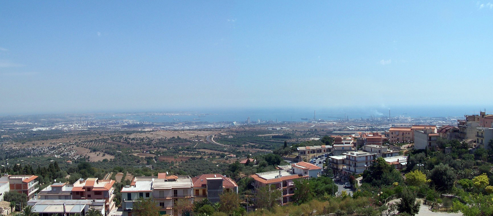 Veduta del petrolchimico di Siracusa da Melilli